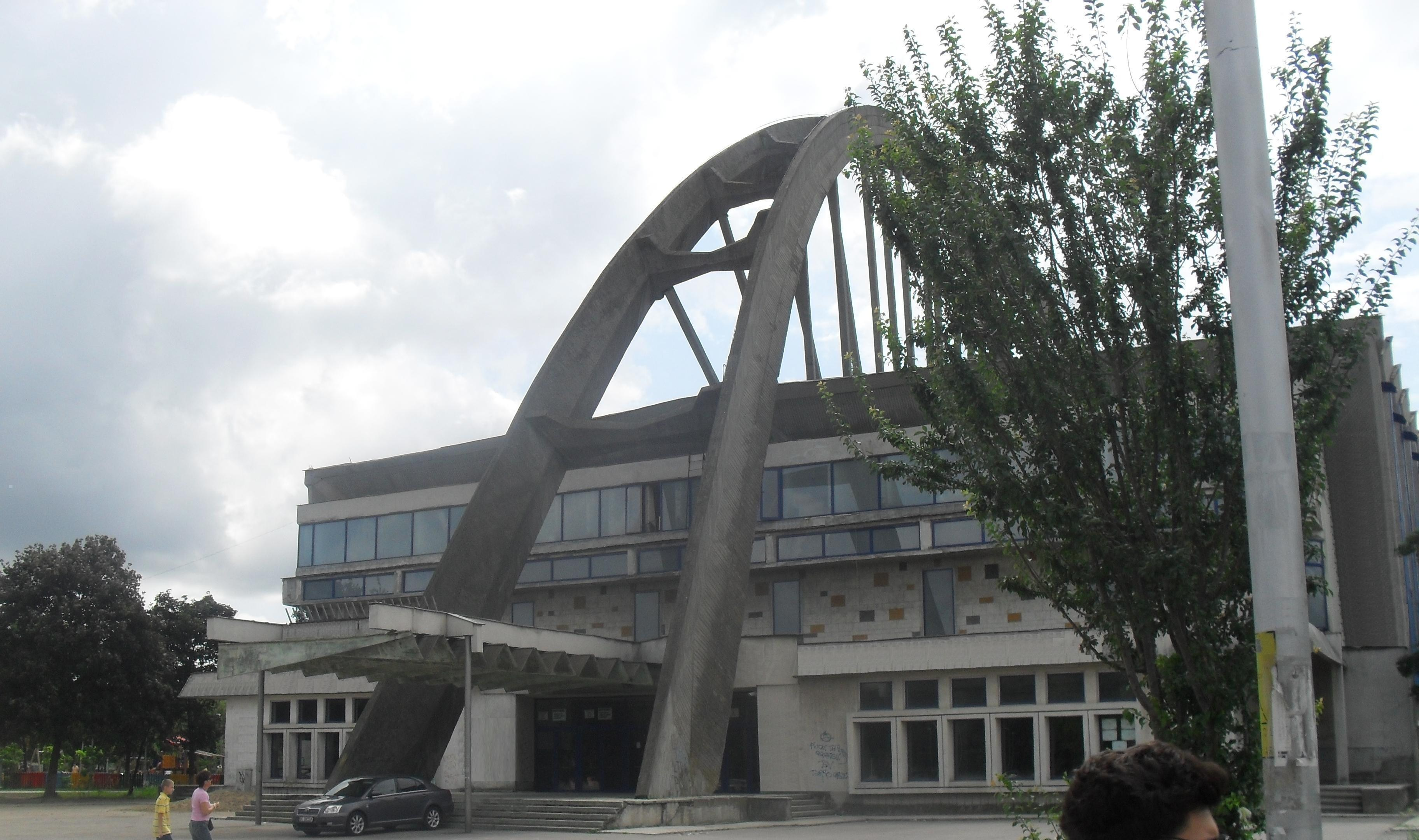 Sala Sporturilor din orasul Bacau, Romania.